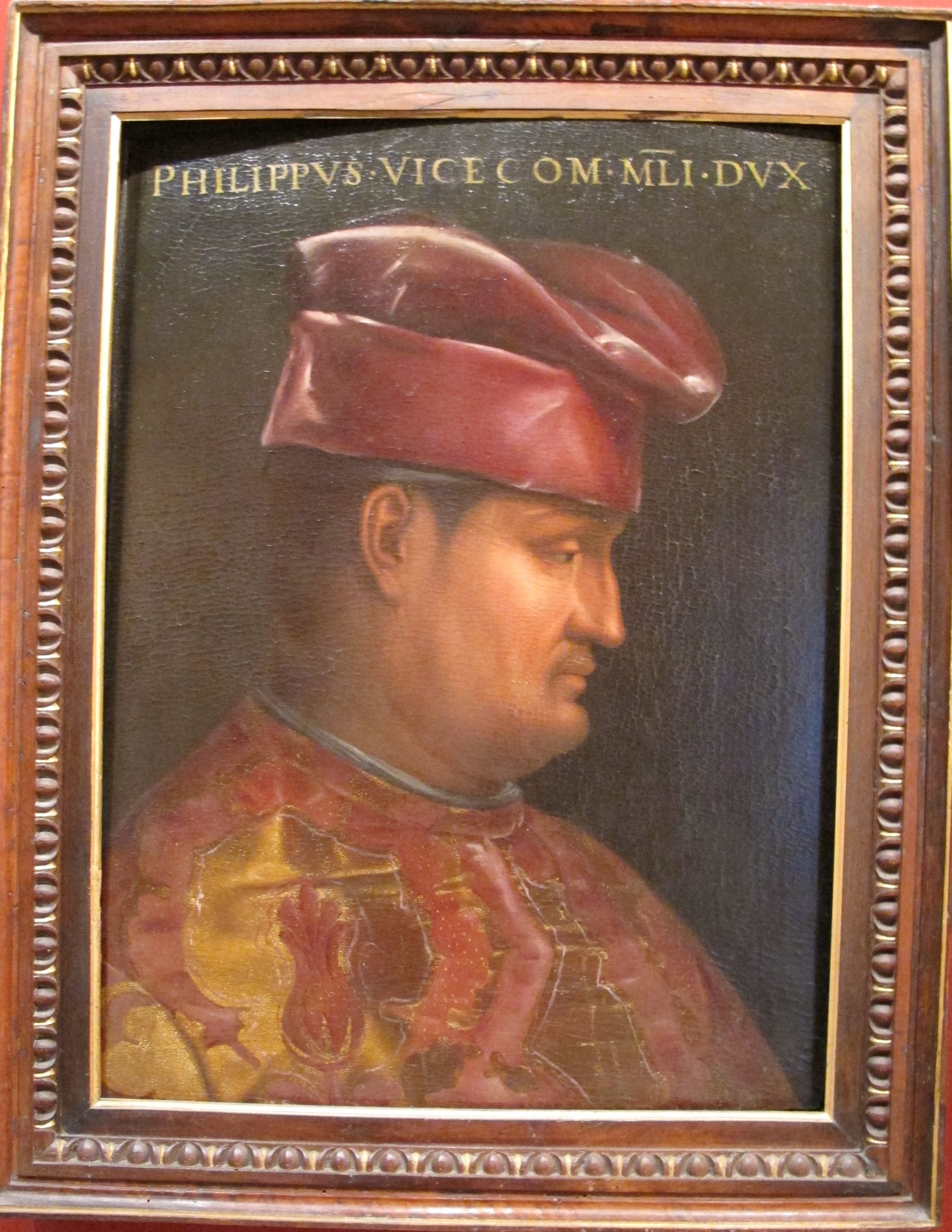 Cristofano dell'altissimo, filippo visconti, ante 1568